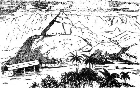 Estrada entre Santos e São Paulo, Brasil. Inclui a Calçada do Lorena, o Caminho do Mar e a Estrada da Maioridade